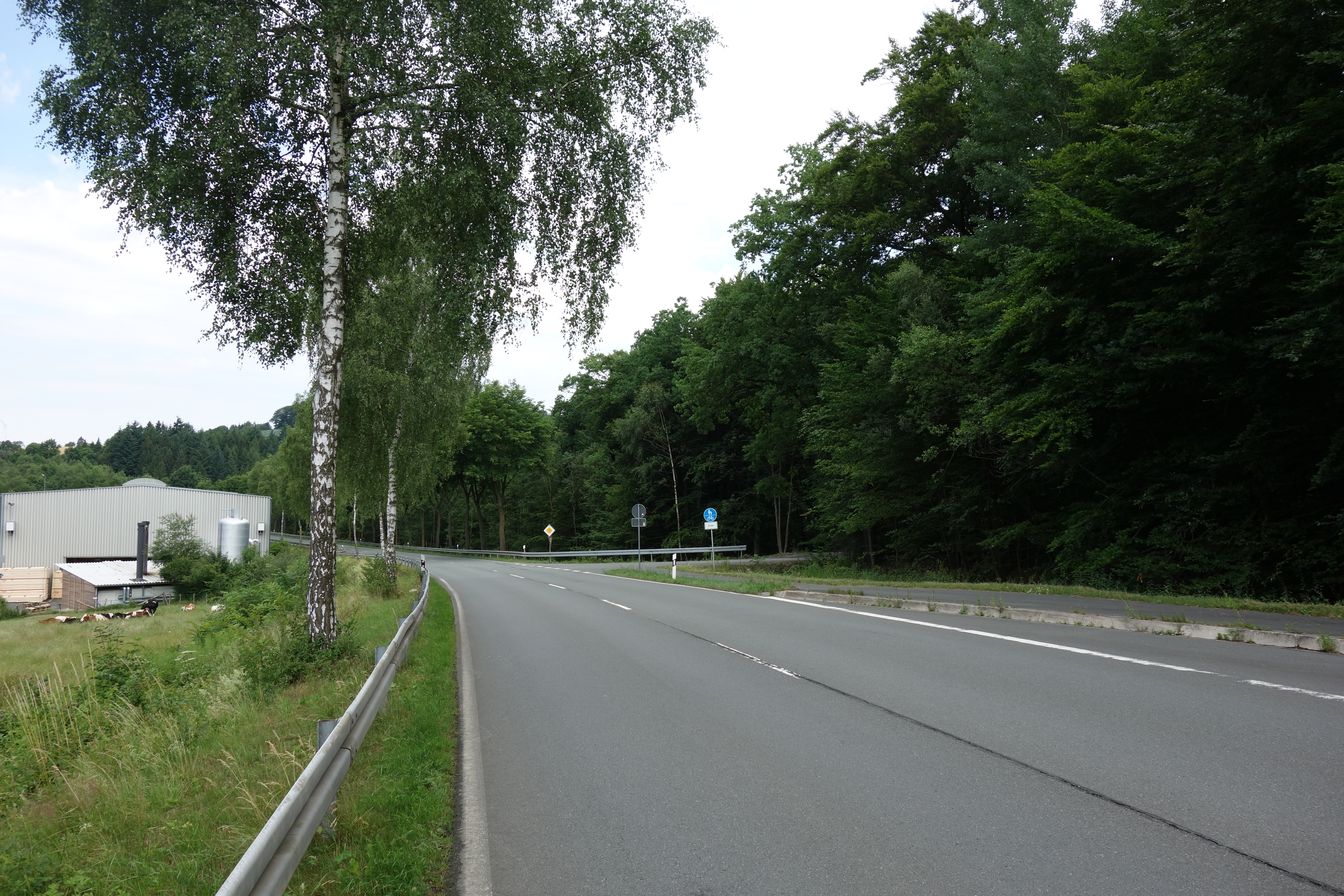 Naturschutzgebiet Laubwald nördlich Drasenbeck neben der Landstraße.